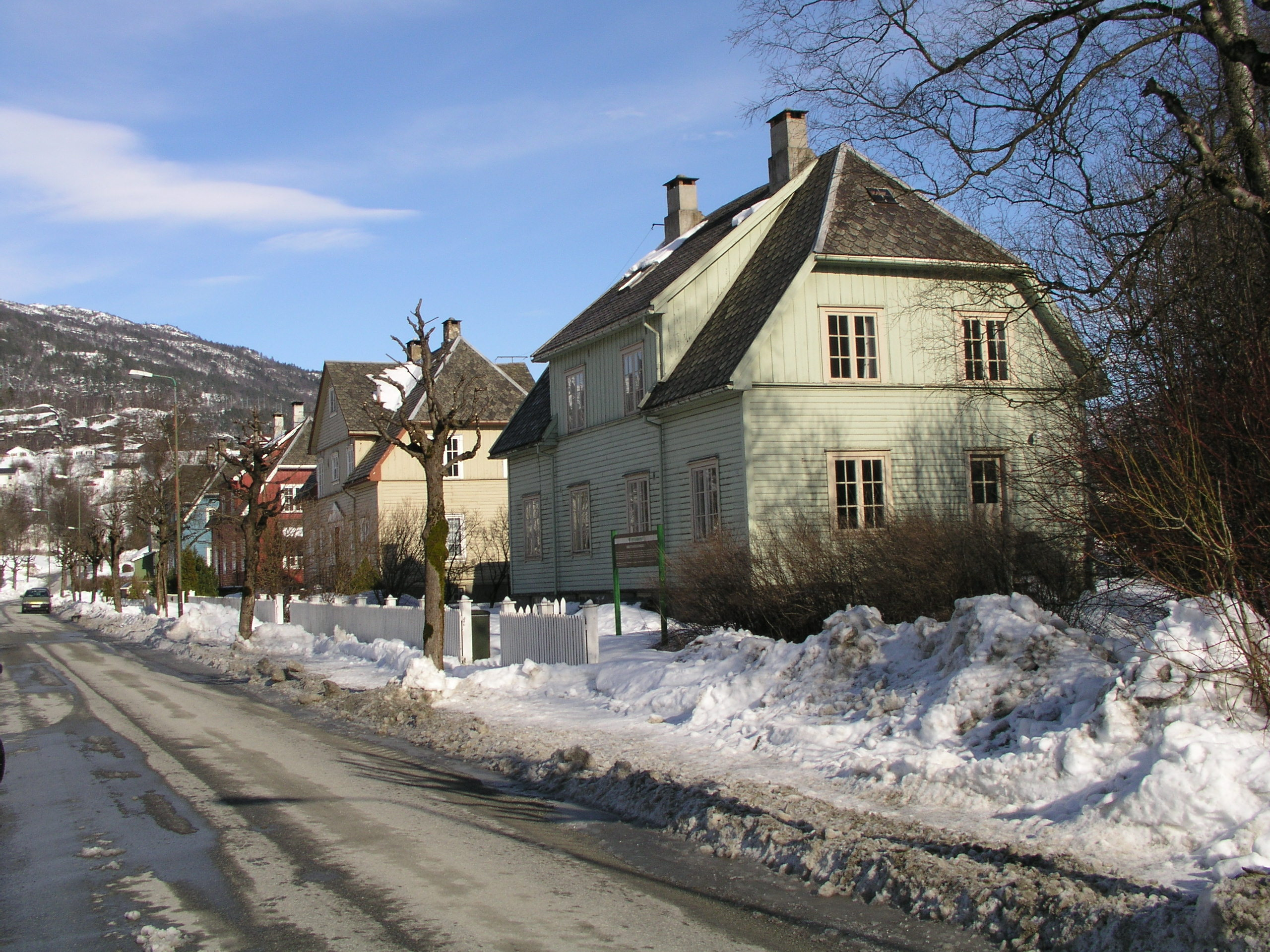 Industiarbeidarmuseet i Sauda er ei avdeling av Ryfylkemuseet.